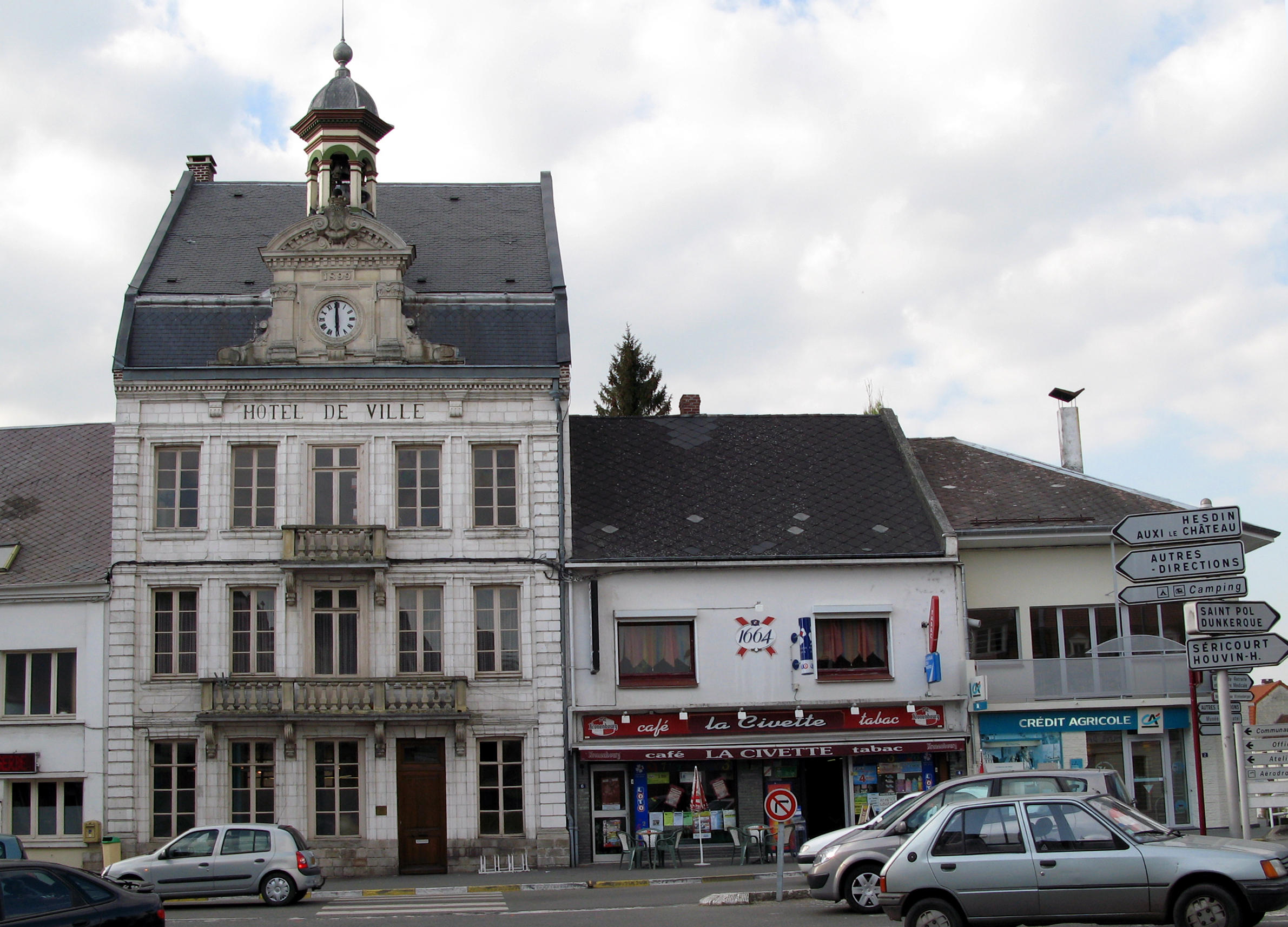 Frévent (Pas-de-Calais, France) - L'hôtel-de-ville. .